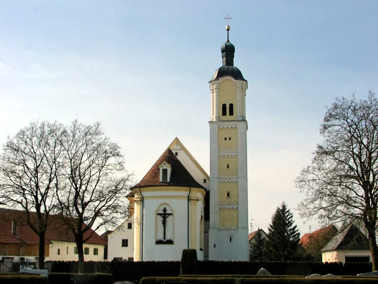 St.Magnus